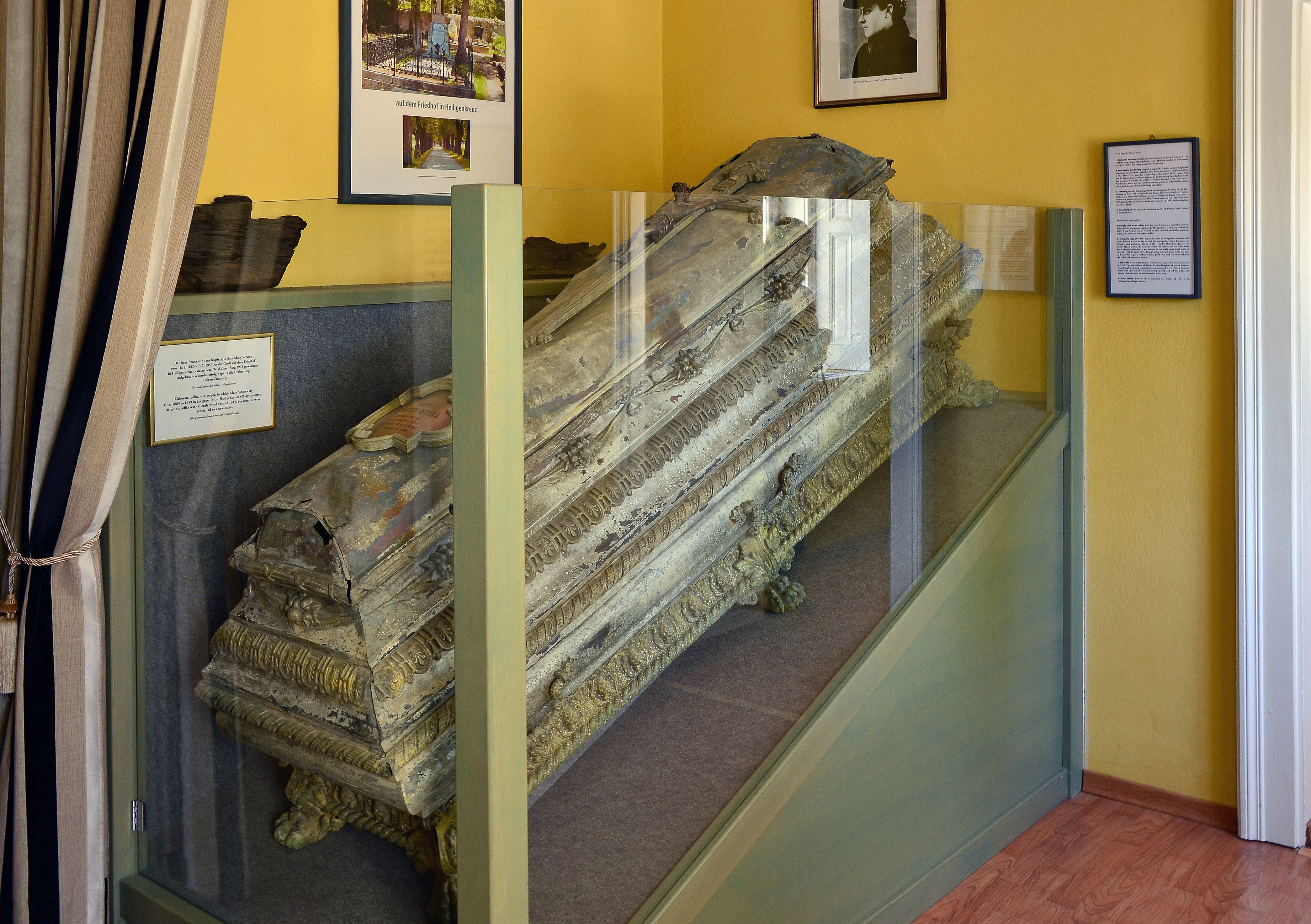 Geschändeter Prunksarg der Mary Vetsera